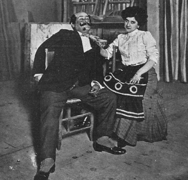 José Moncayo y María Palou en una escena de la obra de teatro El amo de la calle, de Carlos Arniches